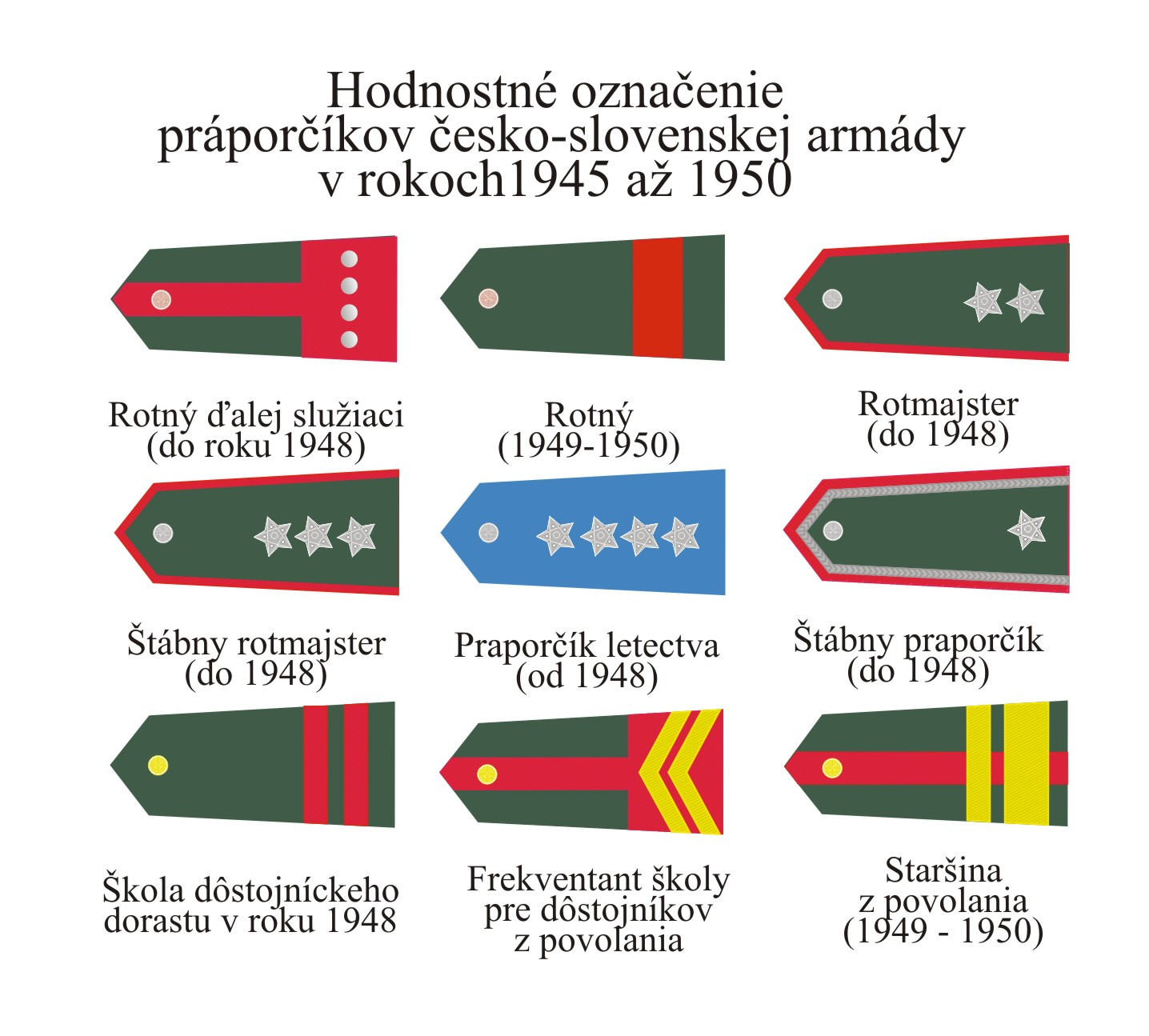 hodnostné označenie práporčíkov Česko-Slovenskej armády v rokoch 1945-1950